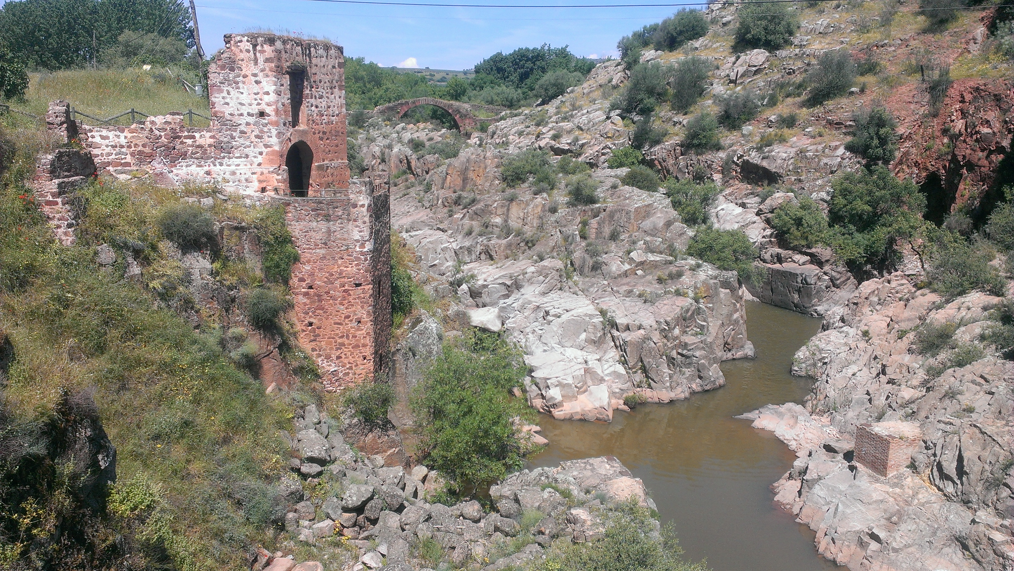 Espacio natural del término municipal de Linares